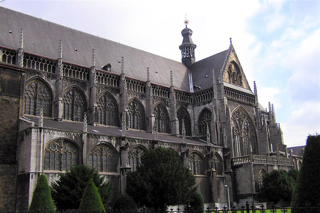 Église Saint Jacques-le-Mineur de Liège, Belgique